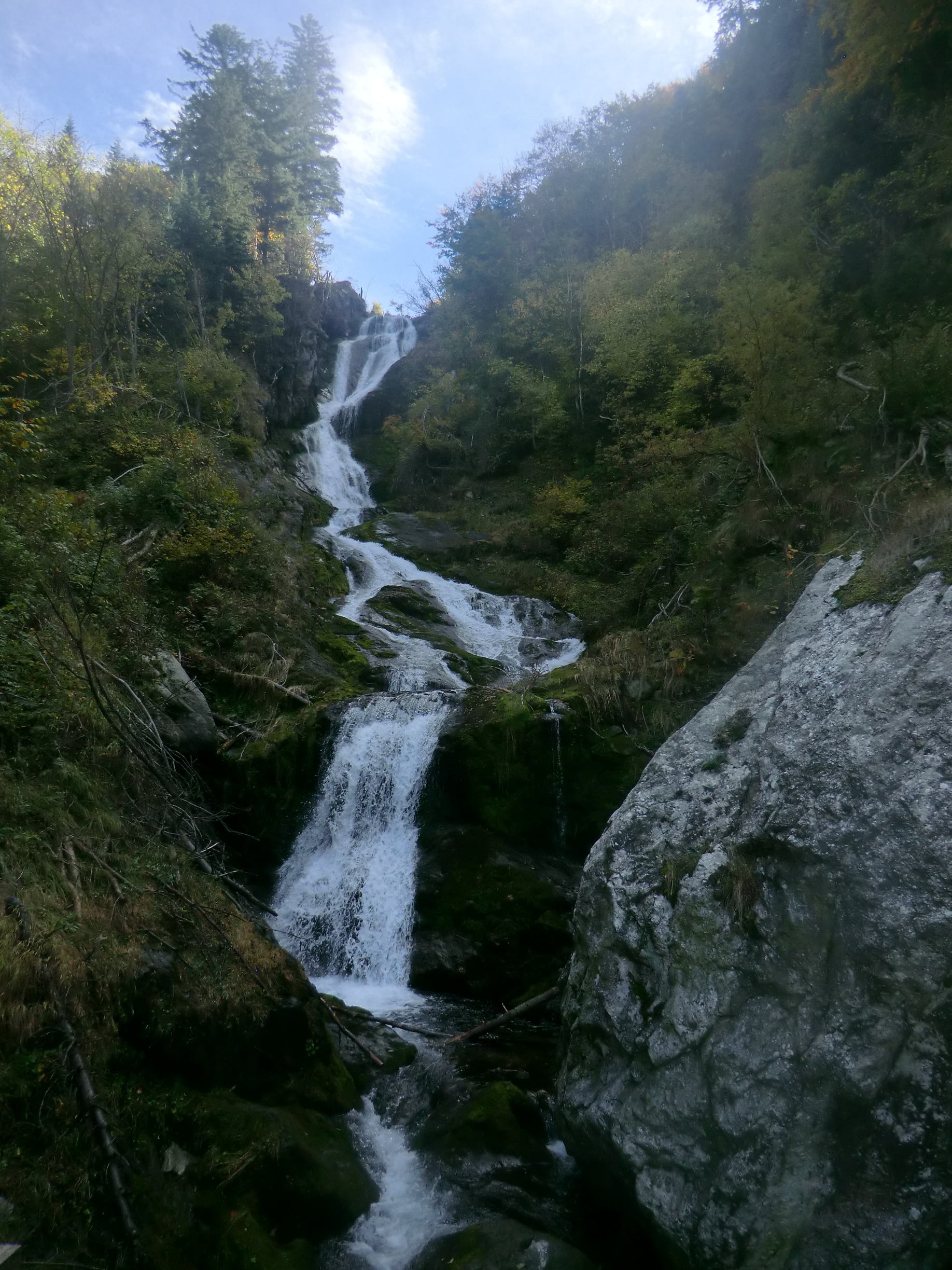 Fiume Pesio: cascate del Saut